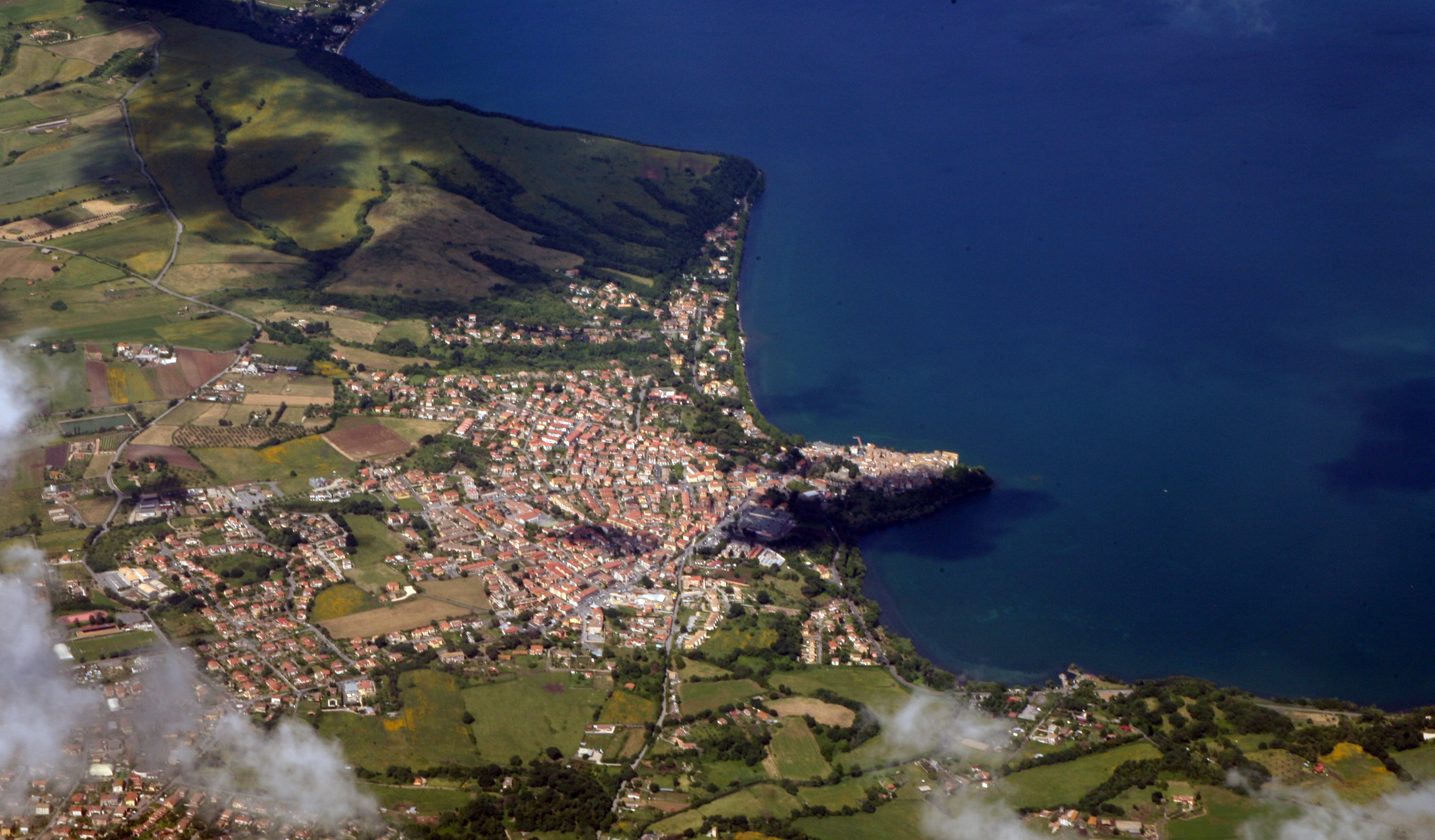 Anguillara Sabazia on Lake Bracciano, near Rome, in Italy.